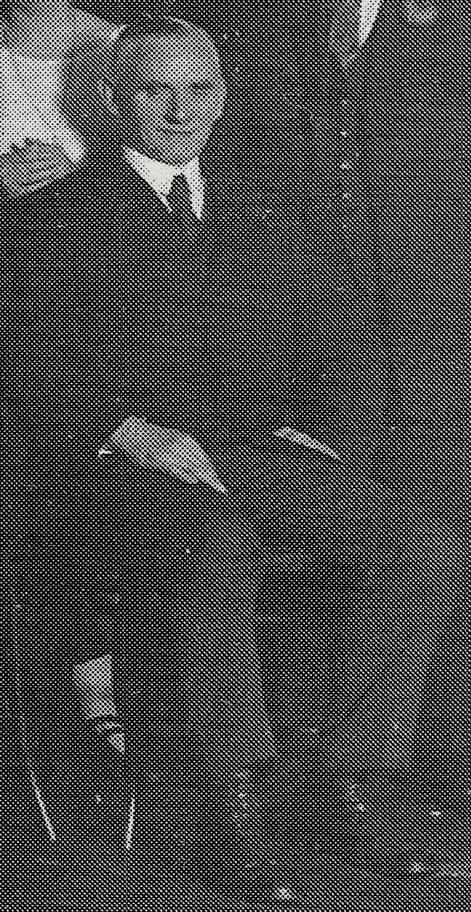 Ernst Scharstein ca. 1922 Ernst Scharstein (1877–1961) DescriptionGerman painterDate of birth/death 22 April 1877 9 May 1961Location of birth/death Hamburg HamburgWork location HamburgAuthority control : Q54155505 VIAF: 1152820069900681881 GND: 1160133336 creator QS:P170,Q54155505